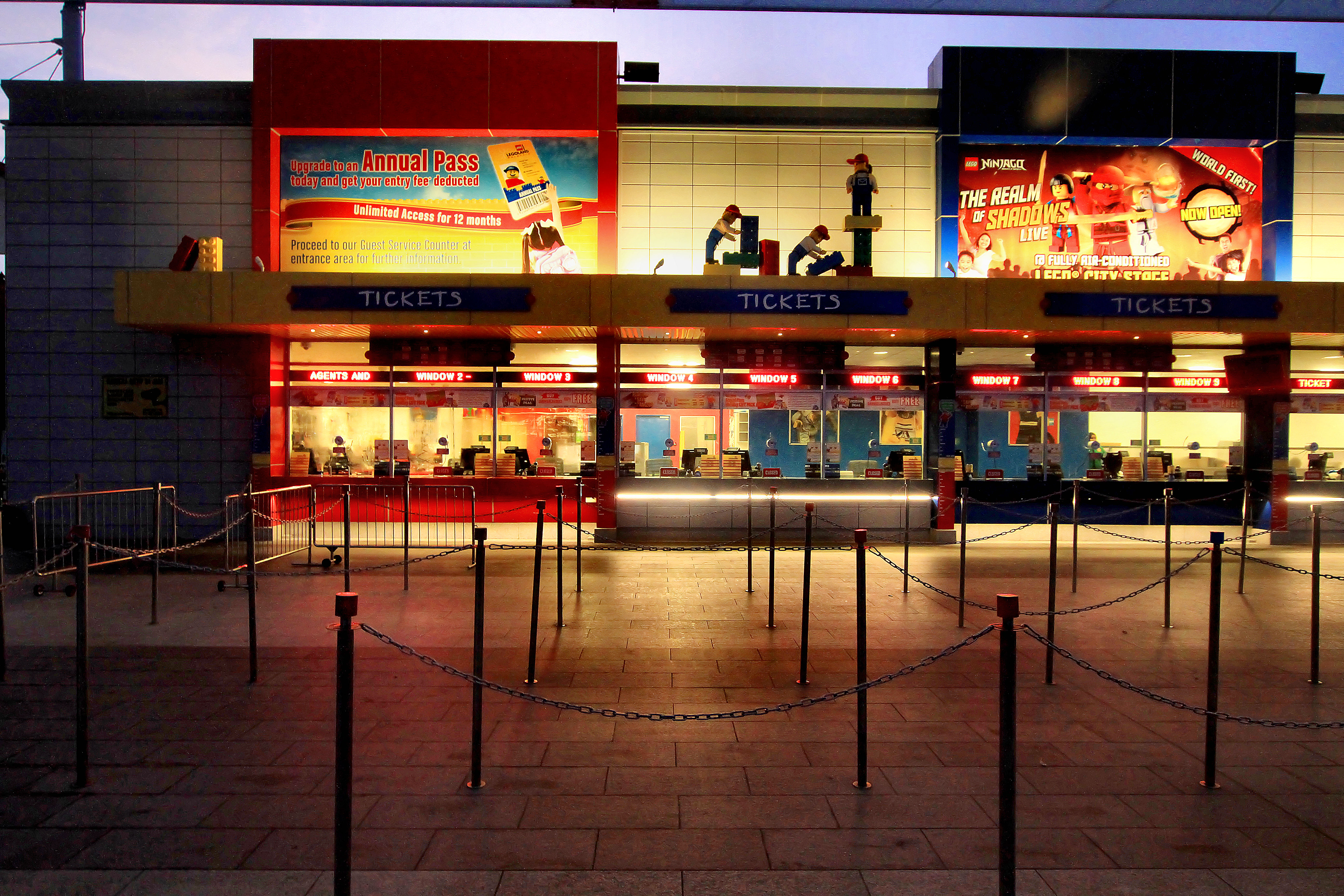 Nusajaya. Johor Darul Takzim. Malaysia.